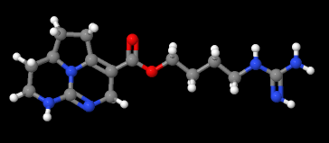 Estructura molecular de la Batzelladina C